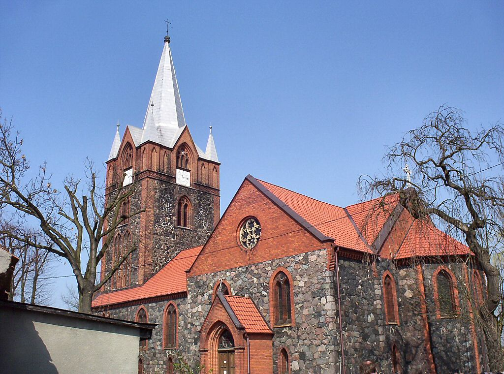 Boleszkowice - kościół (zabytek nr rejestr. 488)